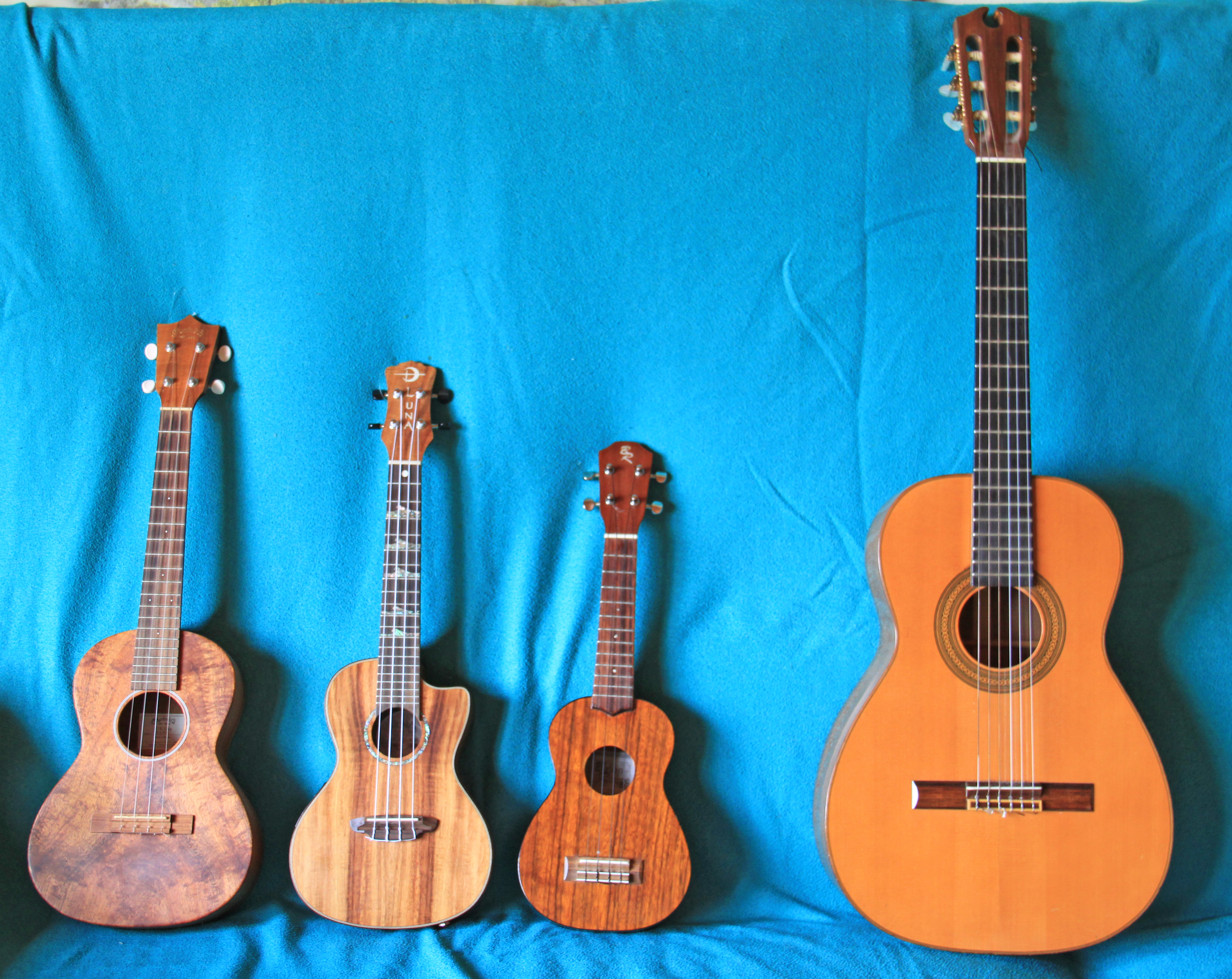 Tenor-, Konzert-, Sopran- Ukulelen (Hersteller Martin, Luna, Baton Rouge), zum Vegleich Konzert Gitarre (Hersteller: Roland Oetter)